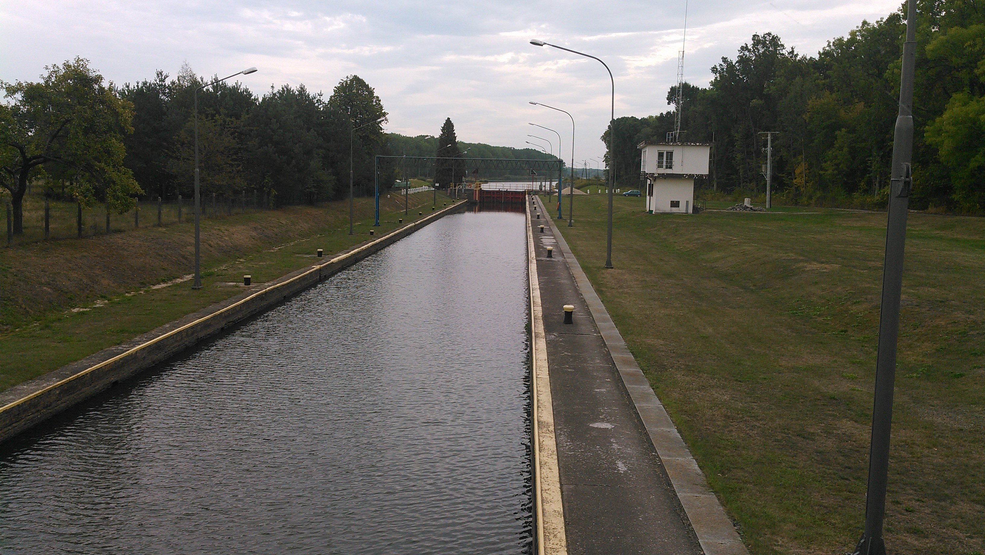 Komora Śluzy Ratowice od strony północno-zachodniej